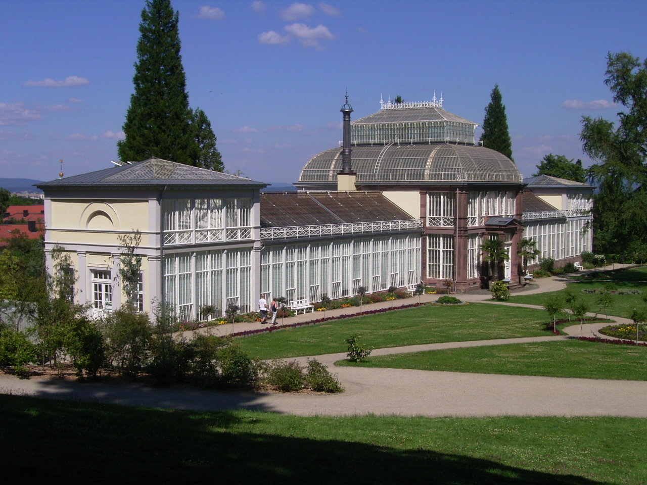 Bergpark wilhelmshoehe grosses gewaechshaus, 2005 Photograph: Benutzer:Hafenbar